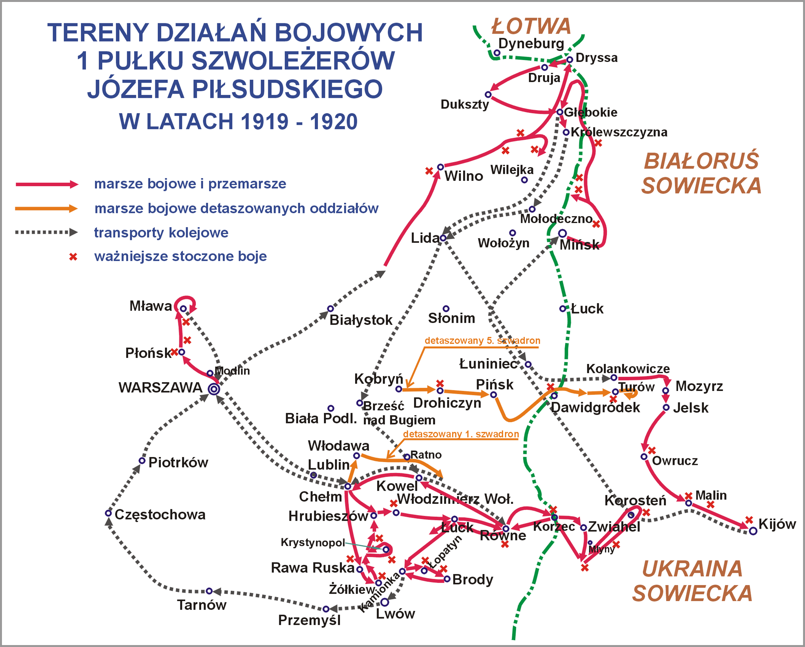 Tereny działań bojowych 1 Pułku Szwoleżerów Józefa Piłsudskiego w latach 1919 -1920